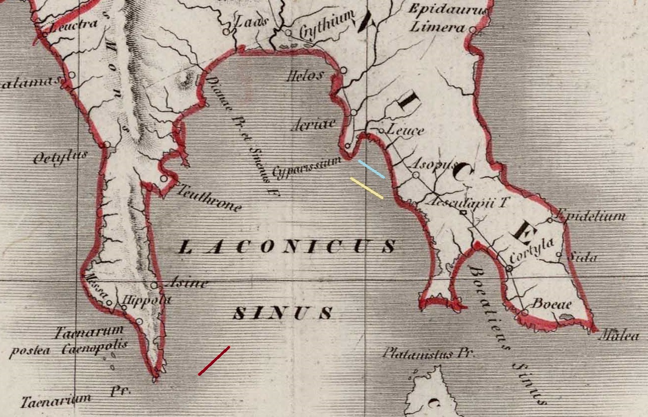 Batalha de Matapão I ― Entrada da Armada Otomana (Esquema táctico simplificado) ―07h00: avista-se a armada otomana, e a armada cristã assume linhas de batalha: ― Vermelho: armada otomana. ― Azul: armada de remo cristã. ― Branco: armada de vela cristã. (Vento de SW)